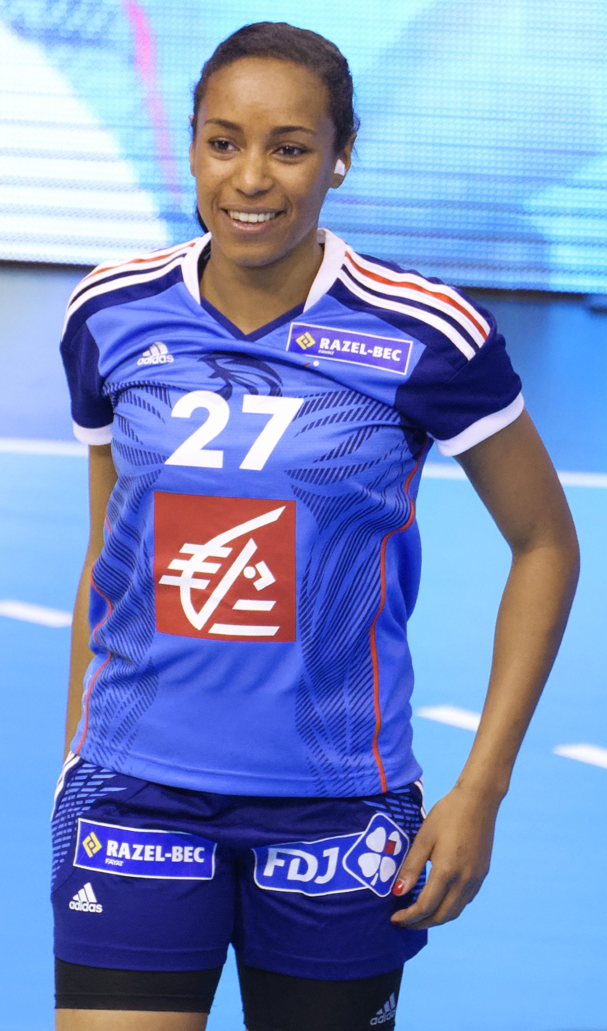 Rencontre entre la France et le Danemark lors de la Golden League 2015. A Dijon, le 19 mars 2015.